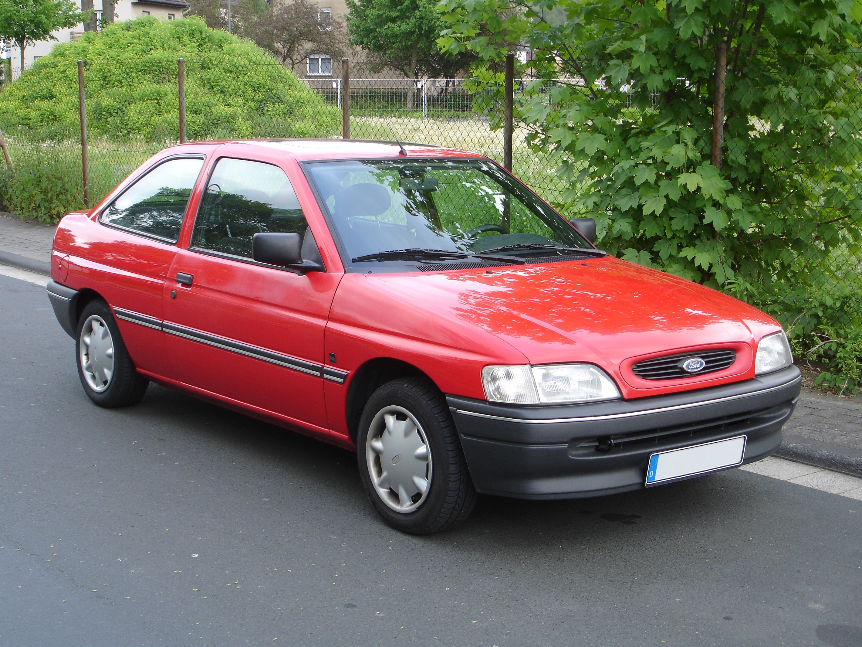 Ford Escort Limousine 2-türig Modell 1993